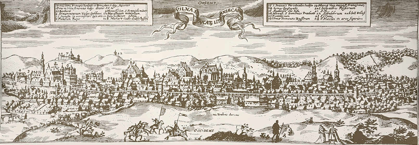 Vilnius panorama in 1600 Беларуская (тарашкевіца): Вільня на гравюры Тамаша Макоўскага